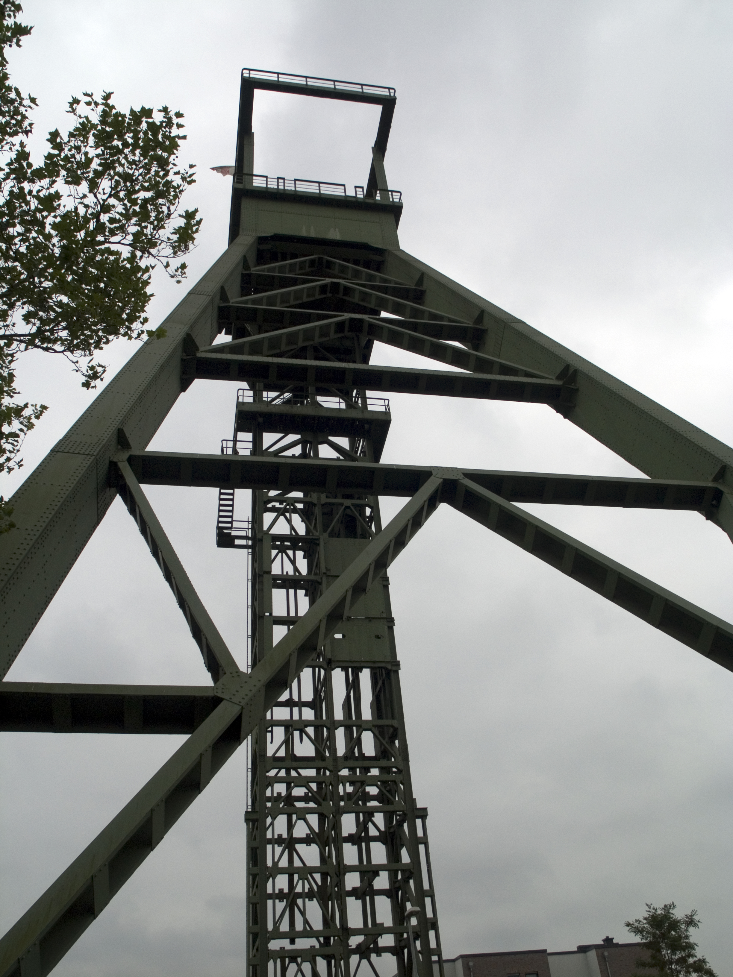 Северный Рейн - Вестфалия, Оберхаузен - шахта Остерфельд